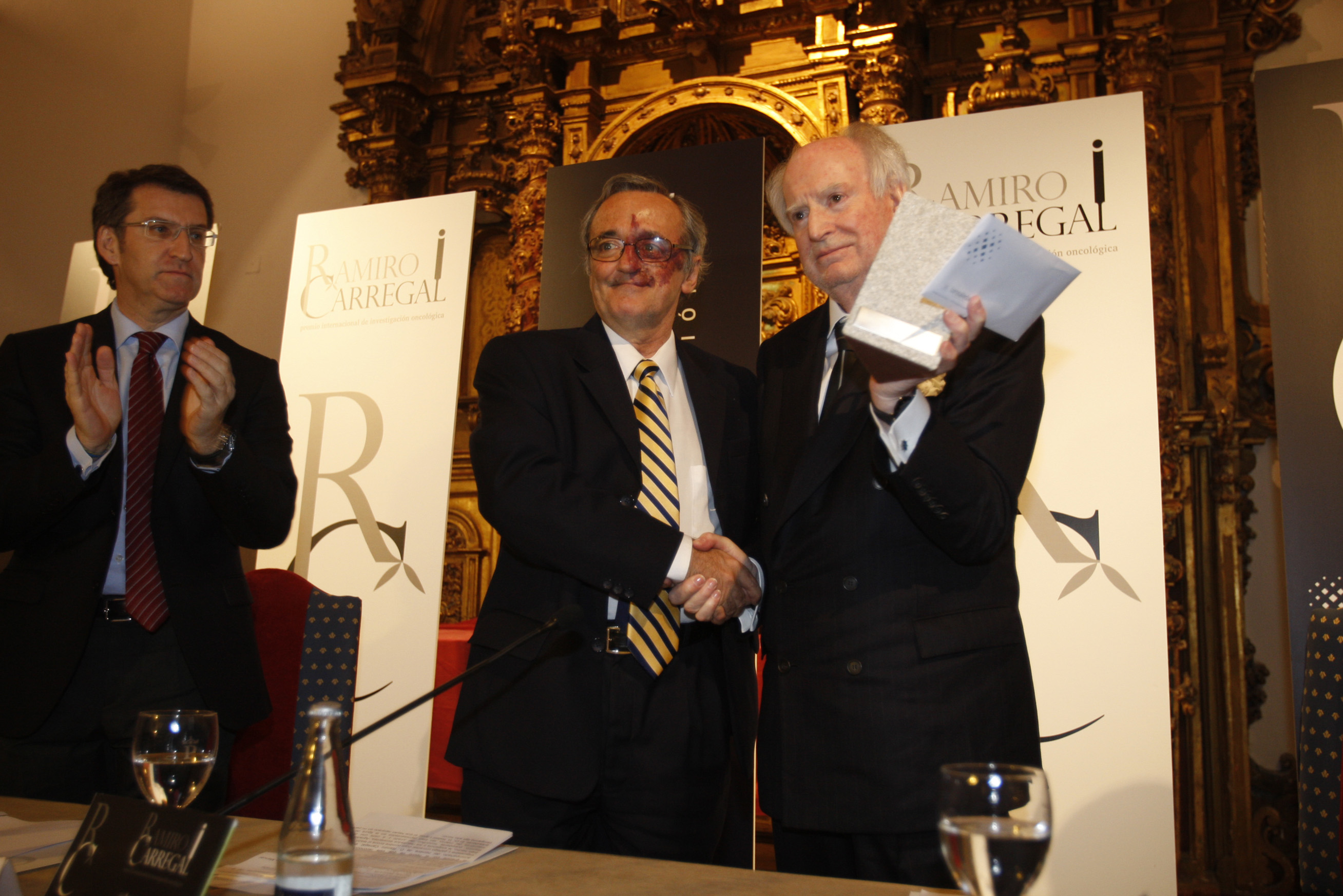 Mariano Barbacid, no centro, recibe o premio de investigación do cancro que patrocina Ramiro Carregal, recolléndoo das súas mans, acto ó que tamén asisteu o presidente da Xunta de Galicia, Alberto Núñez Feijoo.